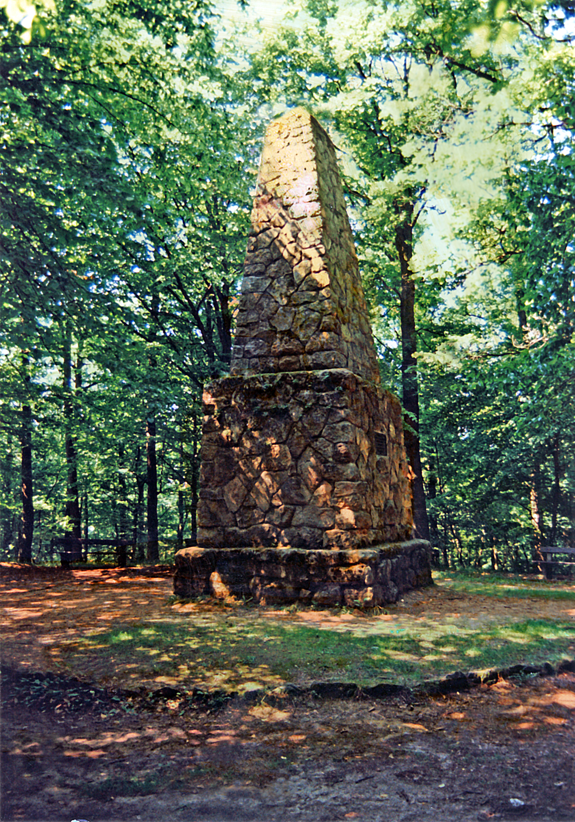 Das 1901 u.a. aus Steinen der rätischen Limesmauer bei Gunzenhausen errichtete Bismarkdenkmal auf dem Schloßbuck.